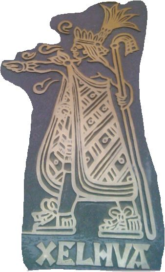 Xelhua según códice de la fundación de Tollan Cholollan se puede apreciar en los portales de San Pedro Cholula, el códice original lo tiene la familia Blanca en la misma ciudad.